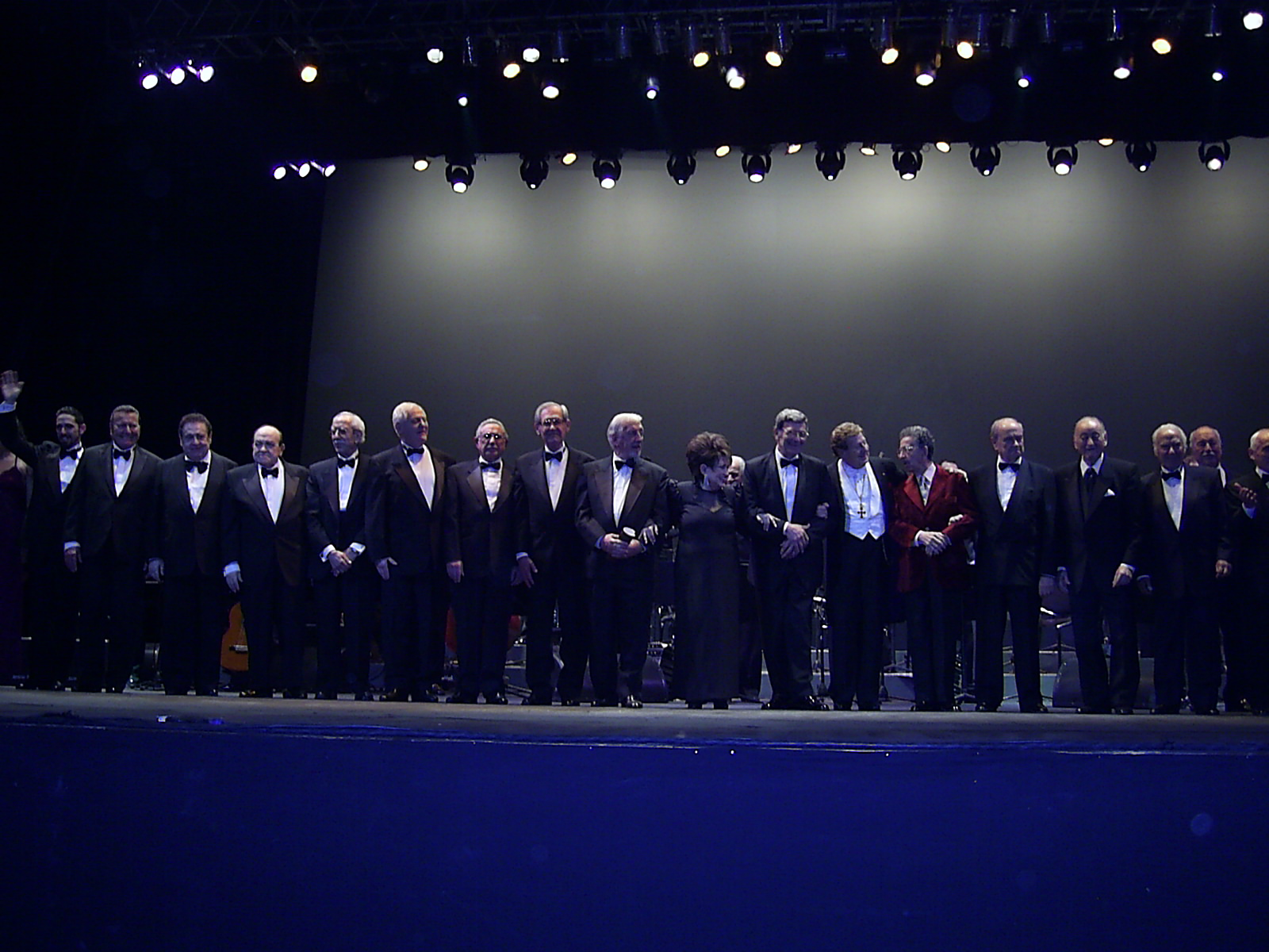 En el escenario en la presentación del Café de los Maestros